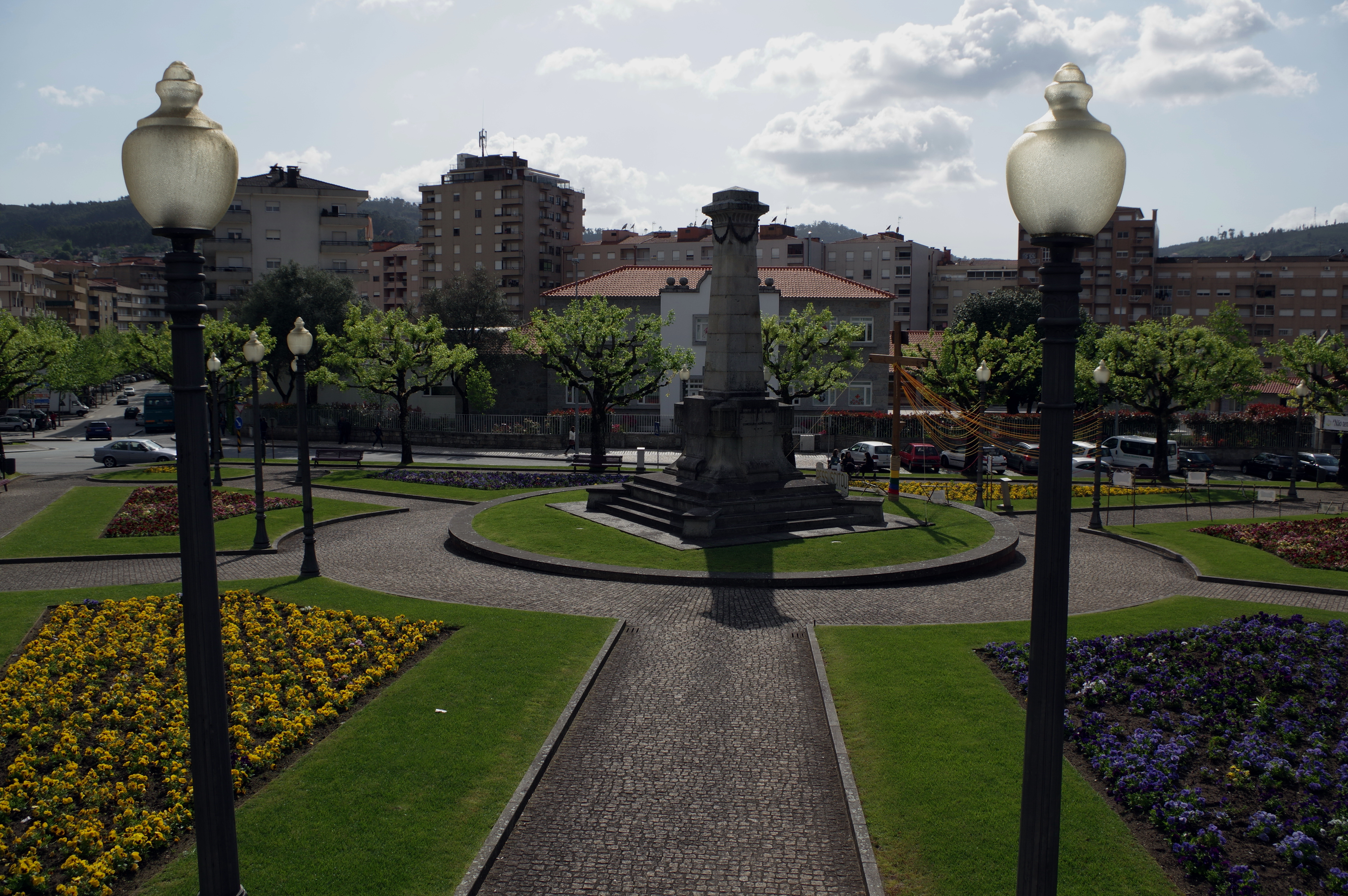 23.4.14 Povoa de Lanhoso 07